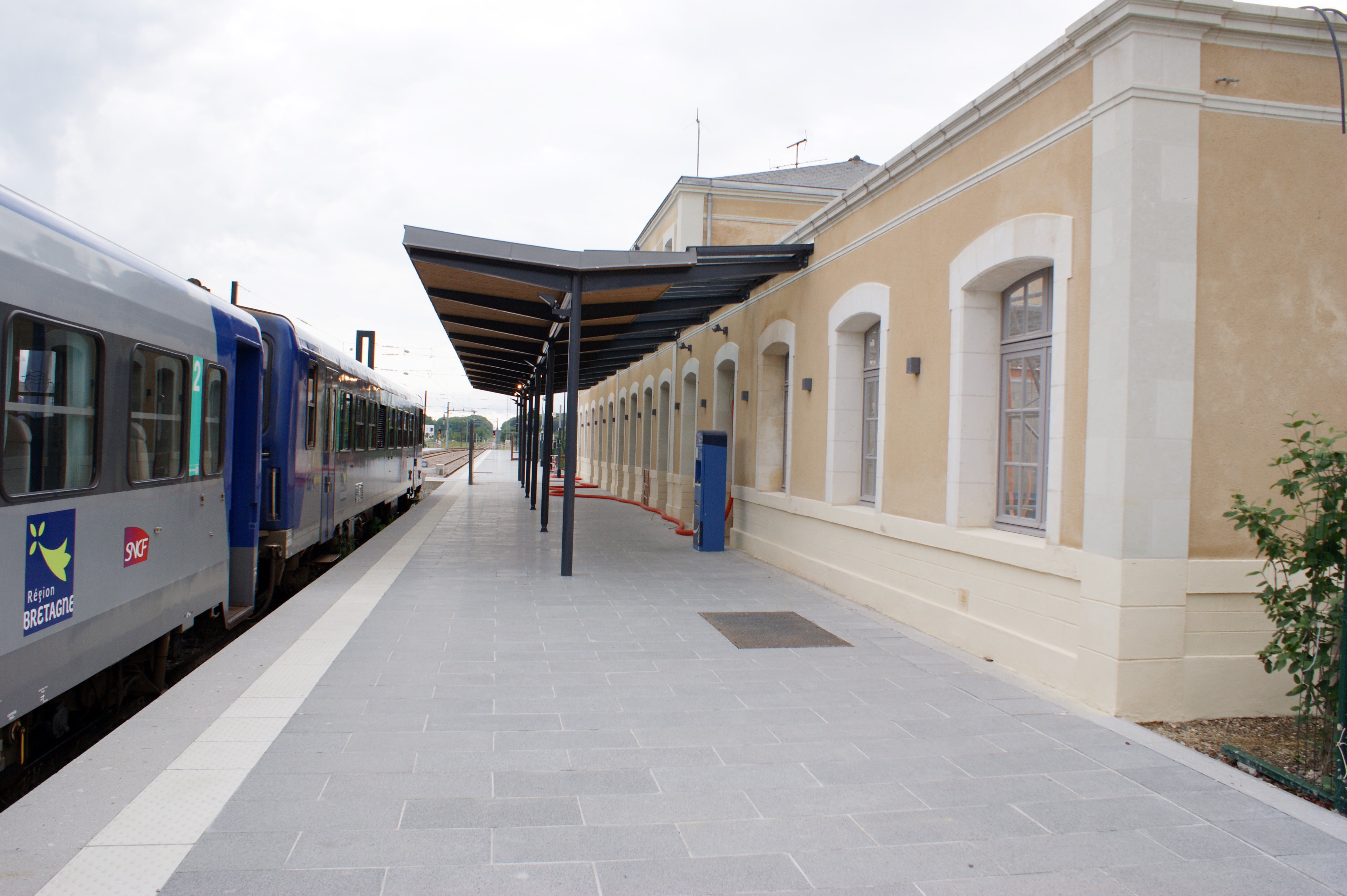 Gare de Châteaubriant, nouveau quai et nouvelle verrière.